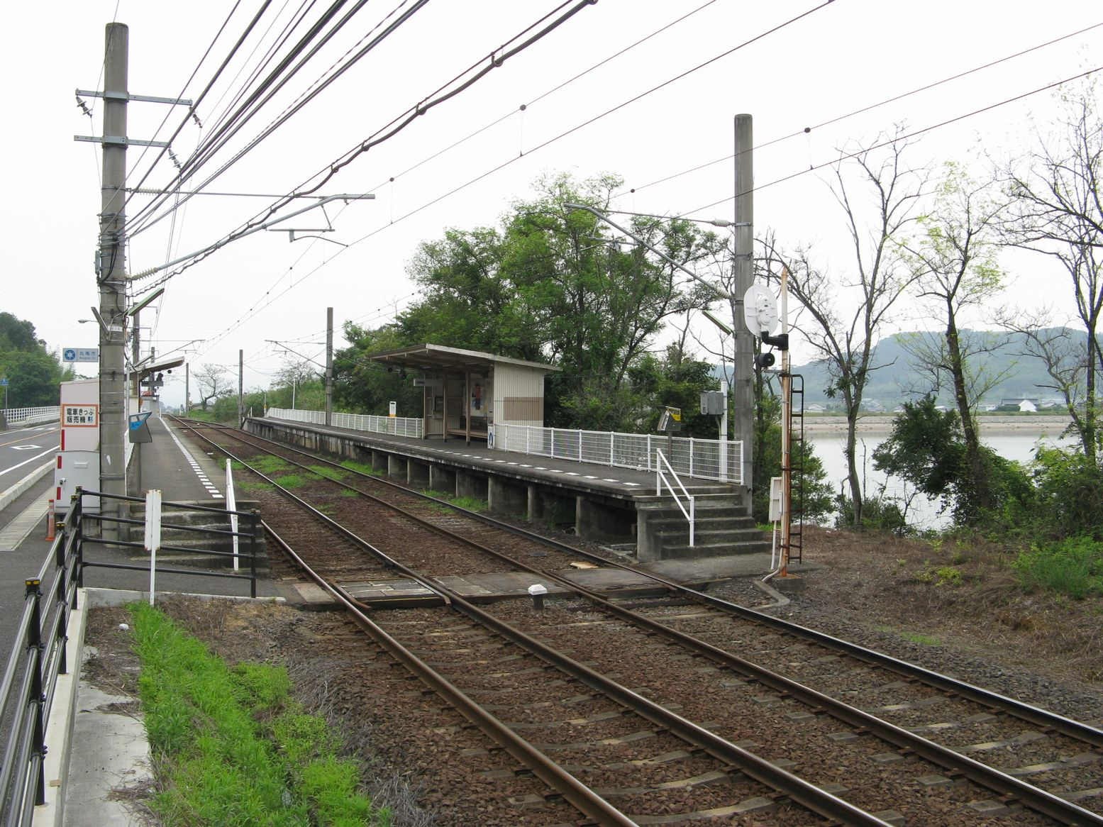 羽間駅構内を東望